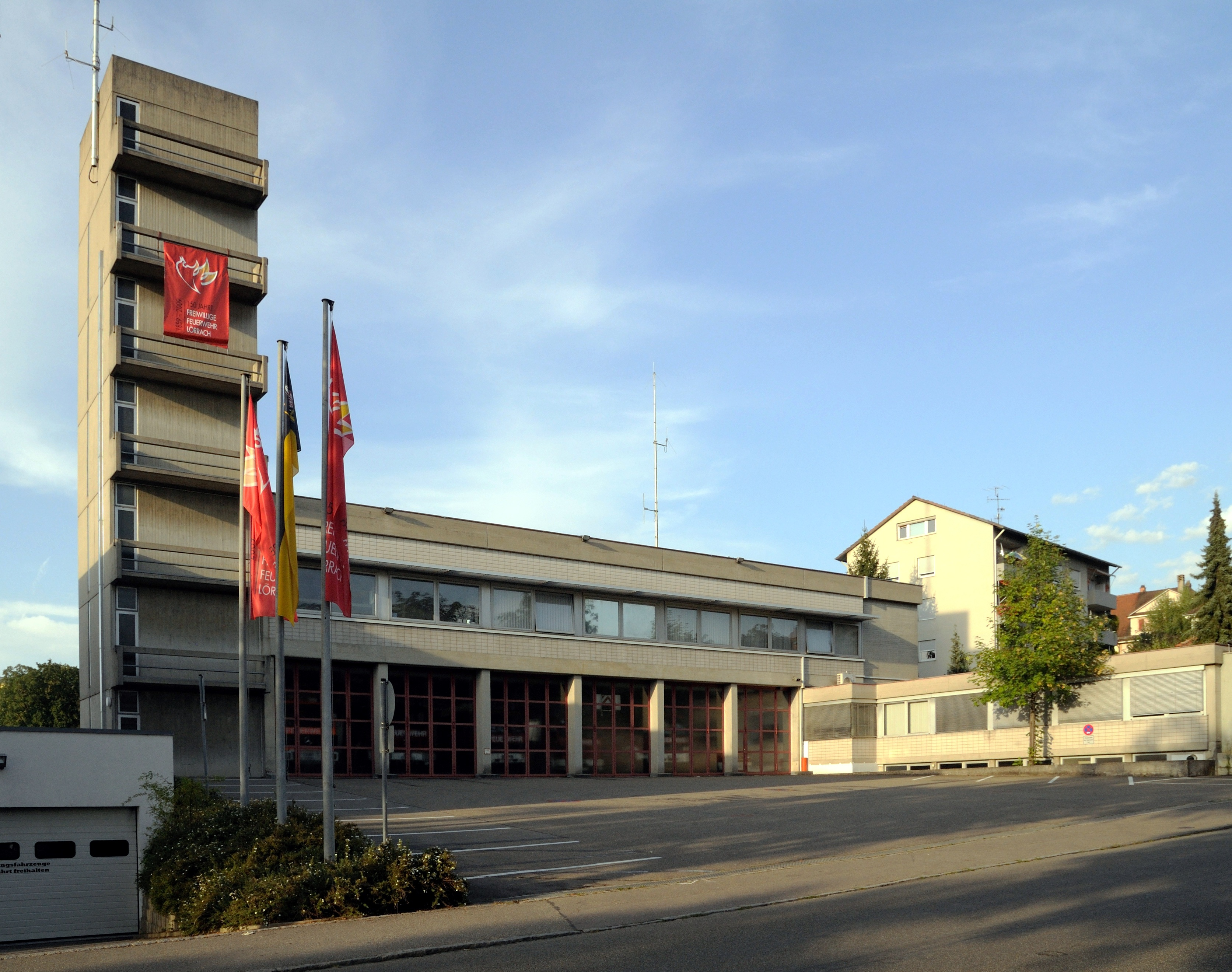 Lörrach: Feuerwache, Stetten